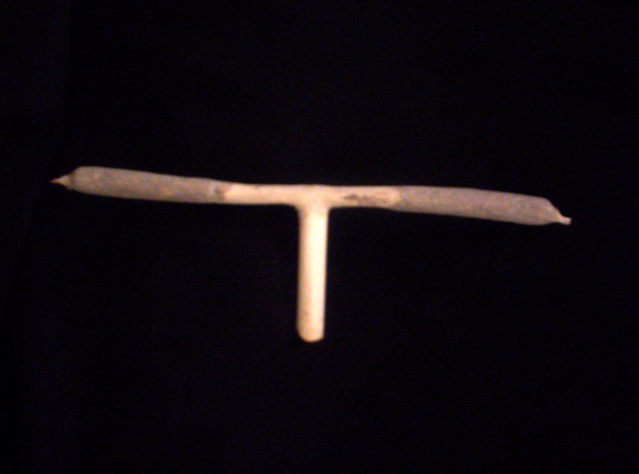 Exemple de roulage particulier : ici une moustache : deux cônes divergeants montés sur un filtre unique.